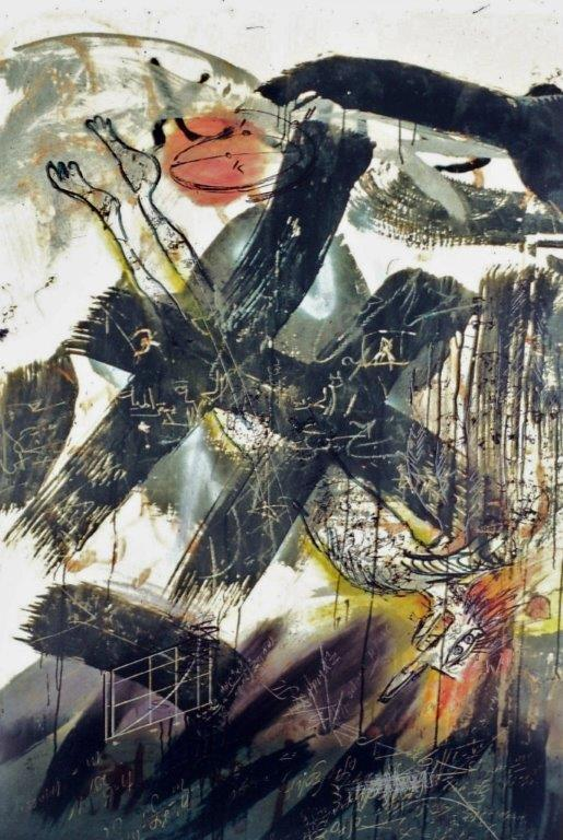 'IKAR', Diamanipulation, Zeichnung 75x50 cm, Copyright Rainer Weingärtner